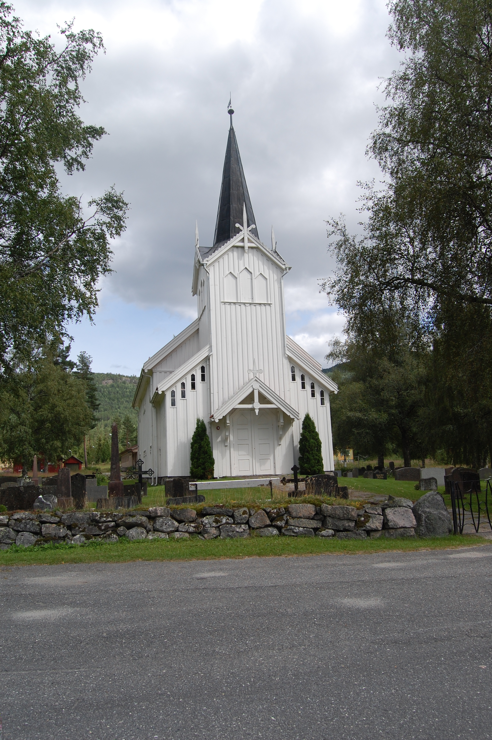 Veum kyrkje i Fyresdal